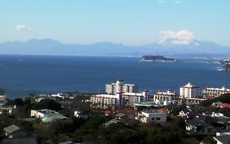 逗子市の披露山庭園住宅（手前）と相模湾の眺望